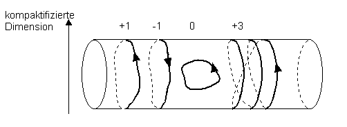 Windungen von Strings um eine kompaktifizierte Dimension